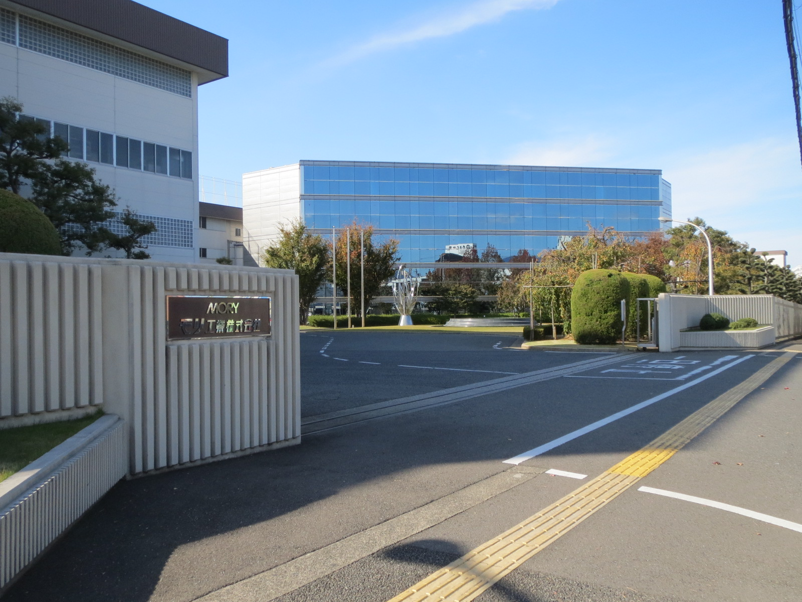 河内長野市にあるモリ工業